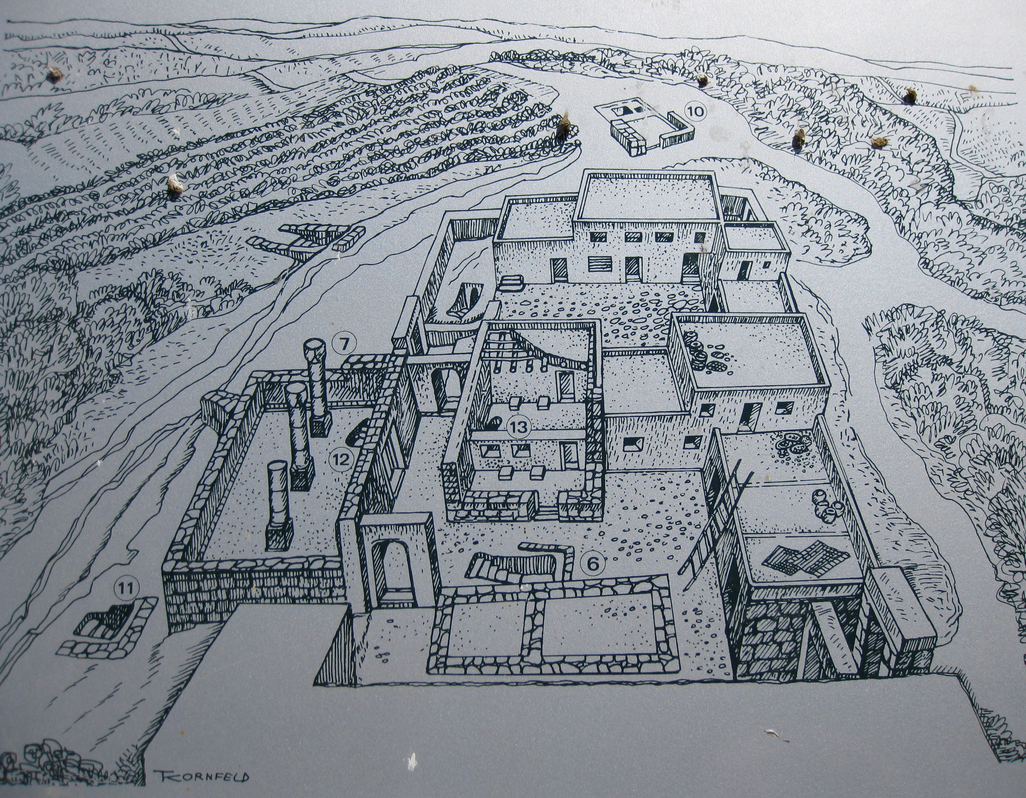 Hirbat Atri חרבת אטרי שלט המשחזר את מראה המקום